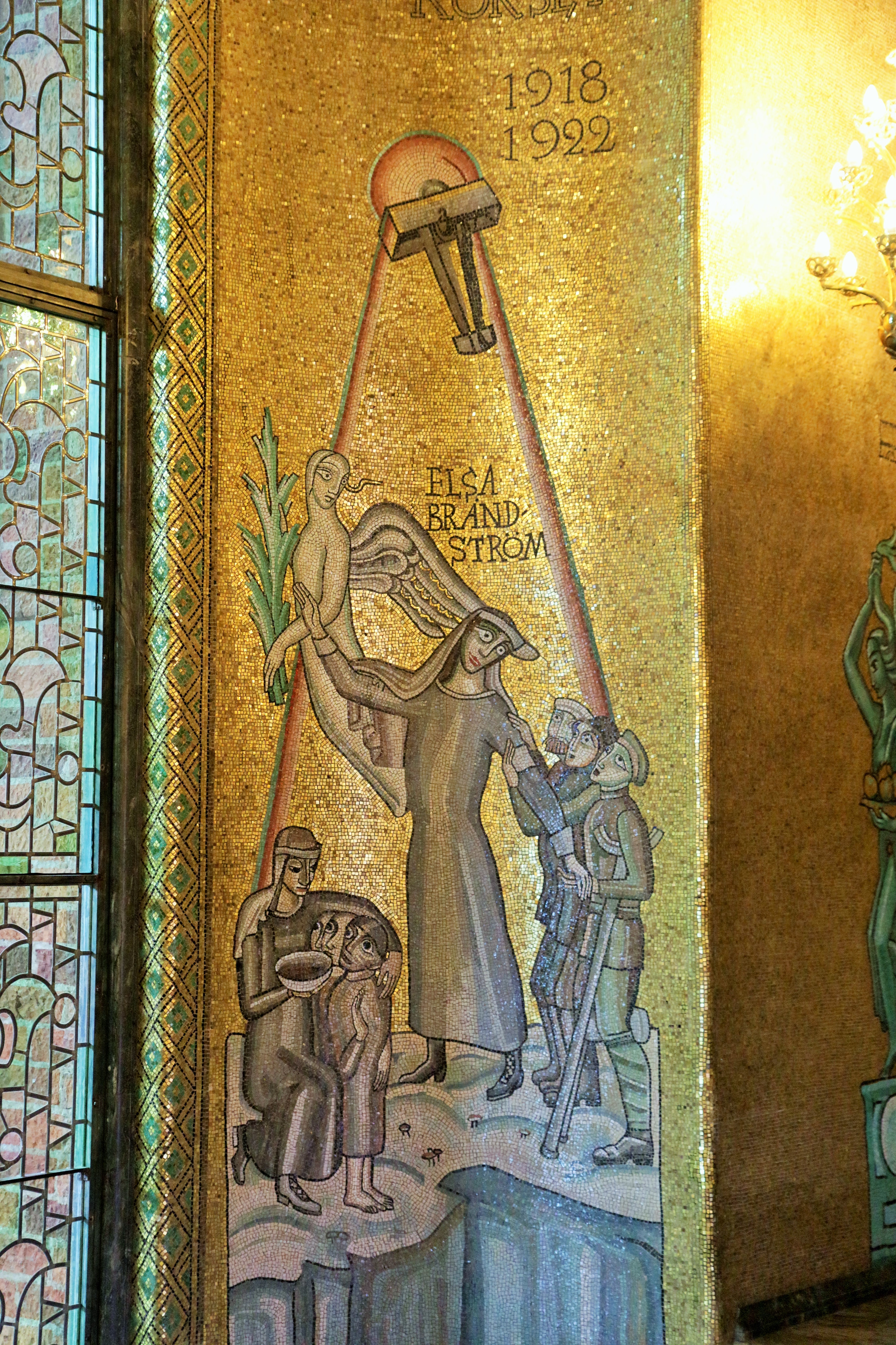 Gyllene Salen i Stadshuset i Stockholm. (The Golden Hall (Swedish: Gyllene Salen) is a banqueting hall in Stockholm City Hall. Measuring 44-metre (144 ft) in height, it received its name when its walls were decorated by mosaics created by the artist Einar Forseth on a proposal by the City Hall architect Ragnar Östberg. The hall is best known as the location of the ball after the annual Nobel Banquet in the City Hall's Blue Hall.)